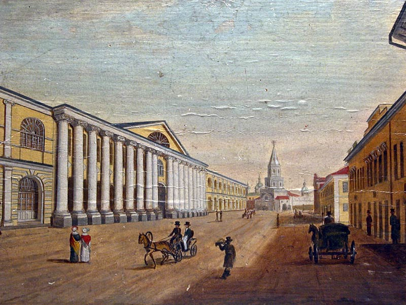 Турин В. С. Гостиный двор. Казань. 1820-е. Бумага, офорт, масло.